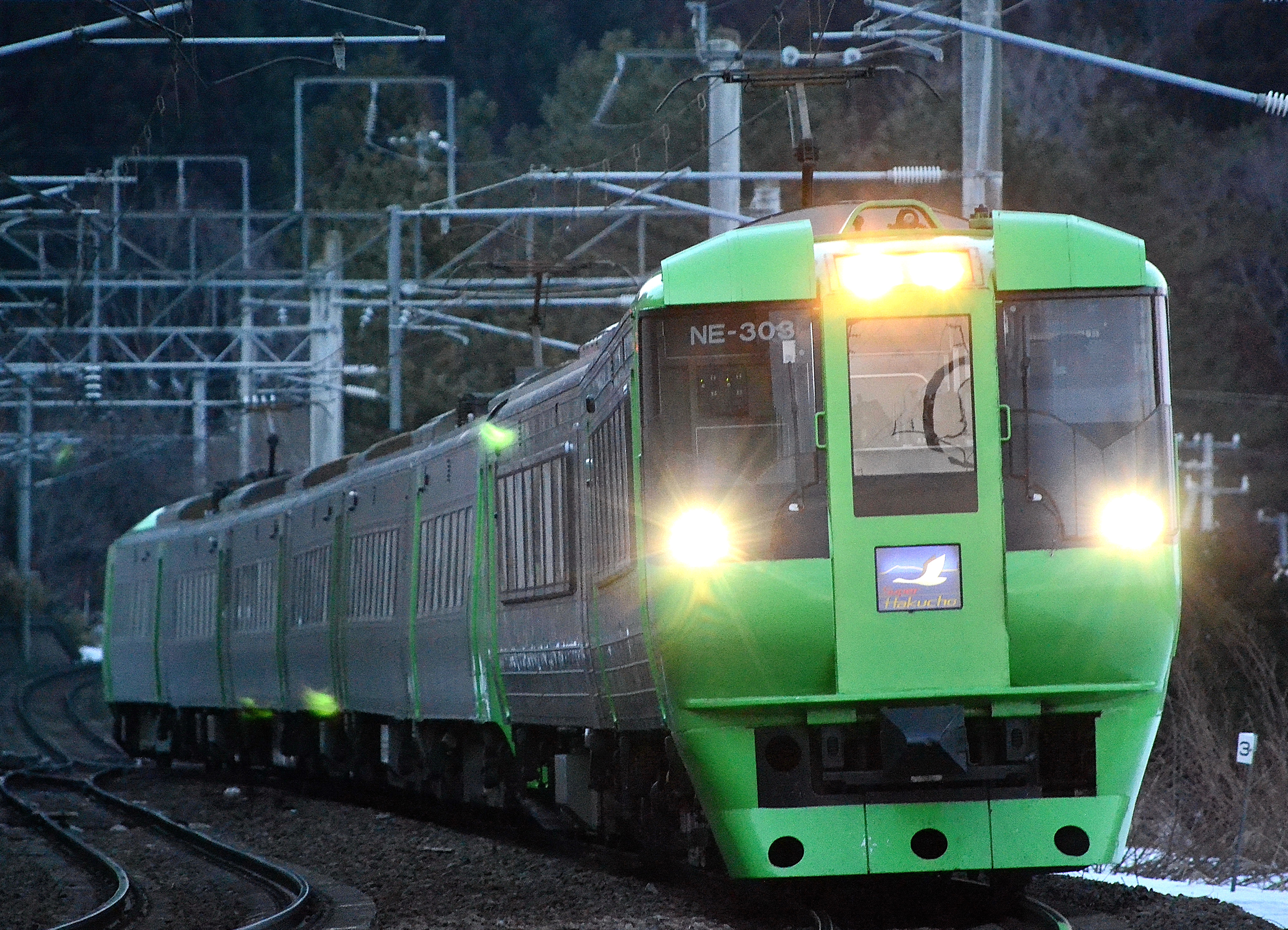 スーパー白鳥で運用される785系300番台